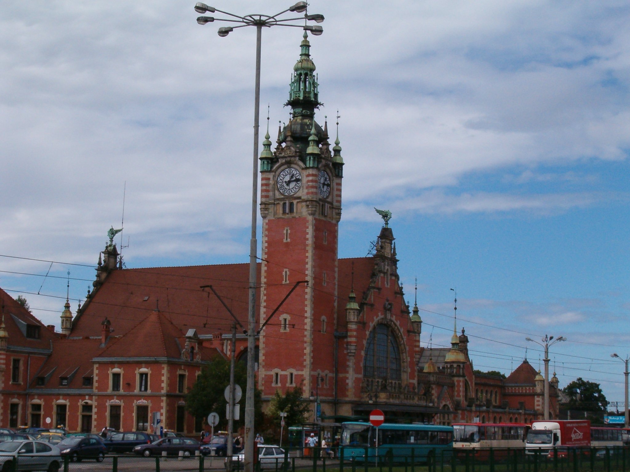 Dworzec PKP Gdańsk Główny.